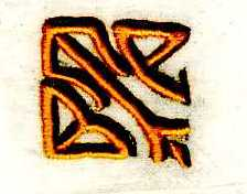 Chiffre brodé au point de cordon ombré, plus foncé sur un bord. Collection M.Peccaud.